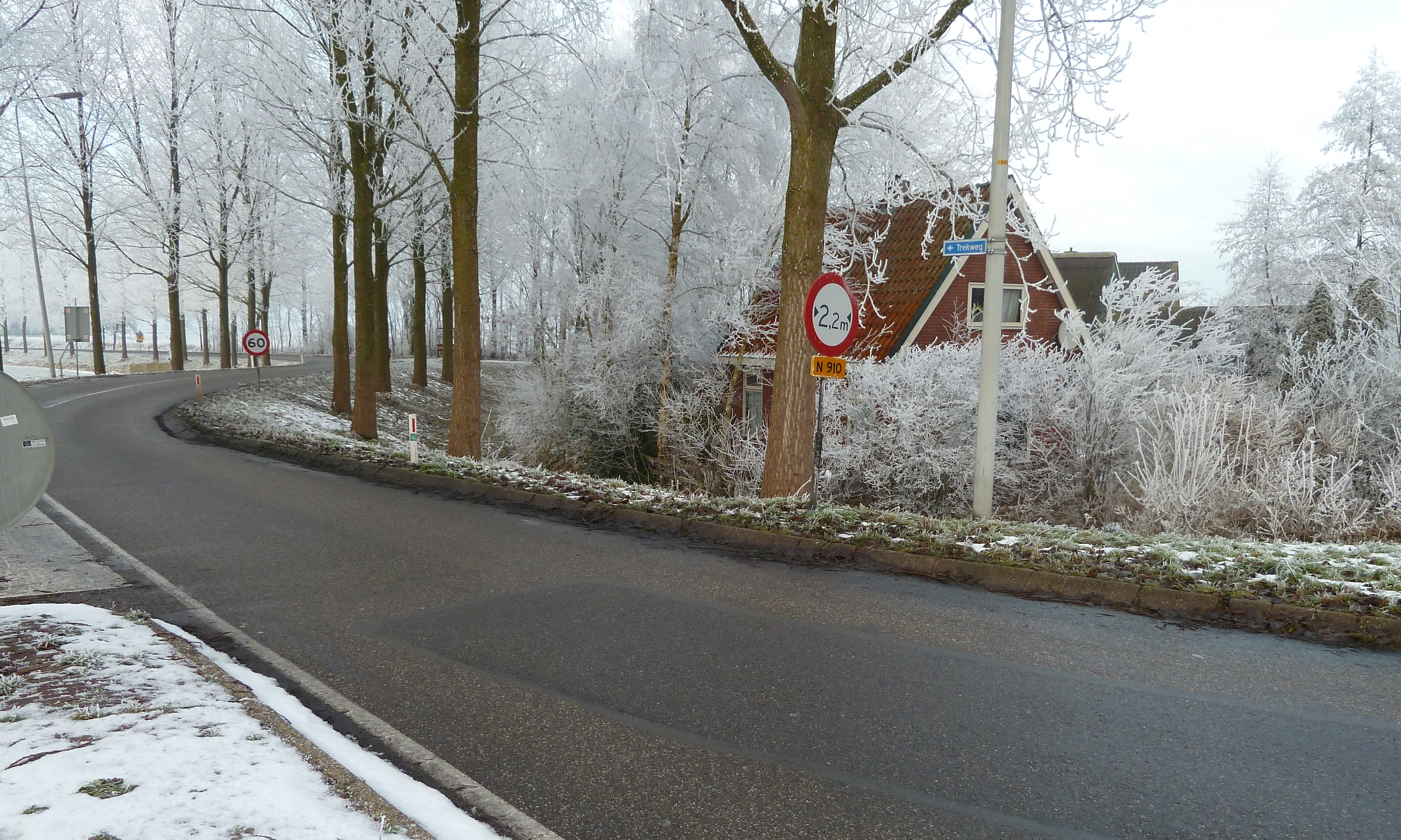 Silhouet van een aantal huizen in het buurtschap De laatste Stuiver gezien vanaf het nabijgelegen kruispunt.